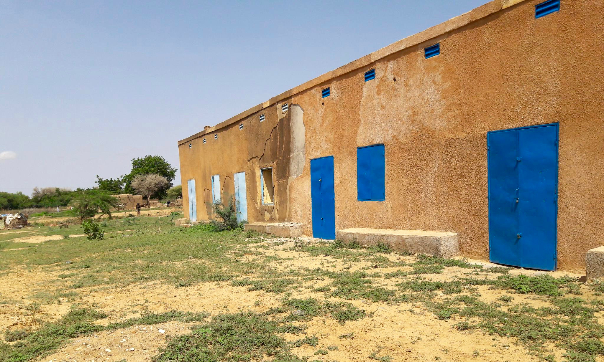 Gebäude beim Camp Pénal Daikana in der Gemeinde Tillabéri, Niger.